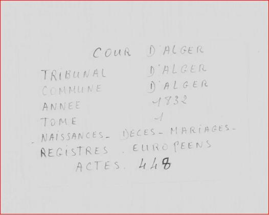 Cliché du registre d'état civil "EUROPEEN" d'Alger (Tome 1: actes de naissances) année 1832.